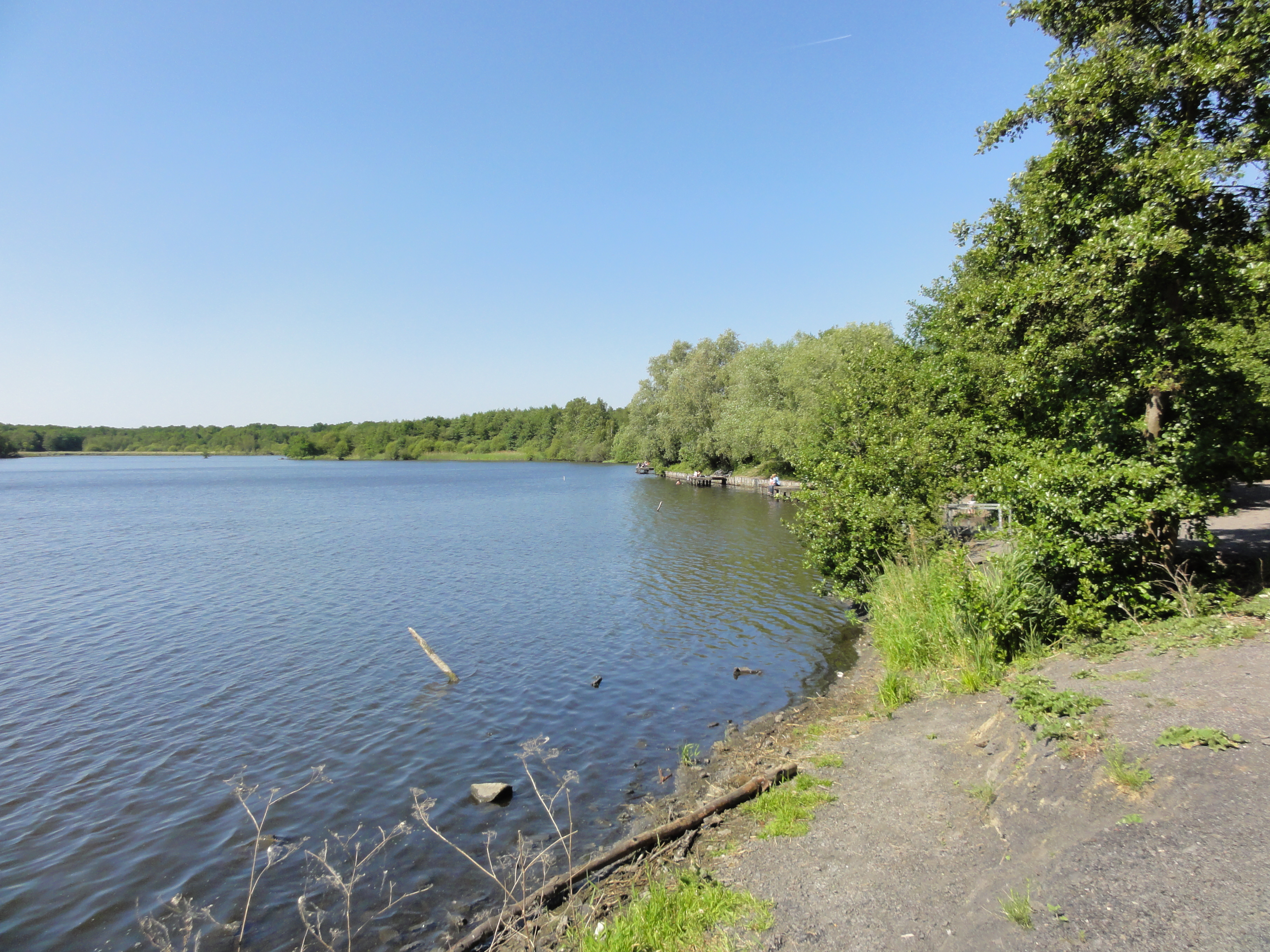 Terril n° 171 dit Mare à Goriaux, fosse Arenberg de la Compagnie des mines d'Anzin dans le bassin minier du Nord-Pas-de-Calais, Wallers et Raismes, Nord, Nord-Pas-de-Calais, France. Le terril no 171 est inscrit sur la liste du patrimoine mondial de l'Unesco le 30 juin 2012 et y constitue en partie le site no 15.